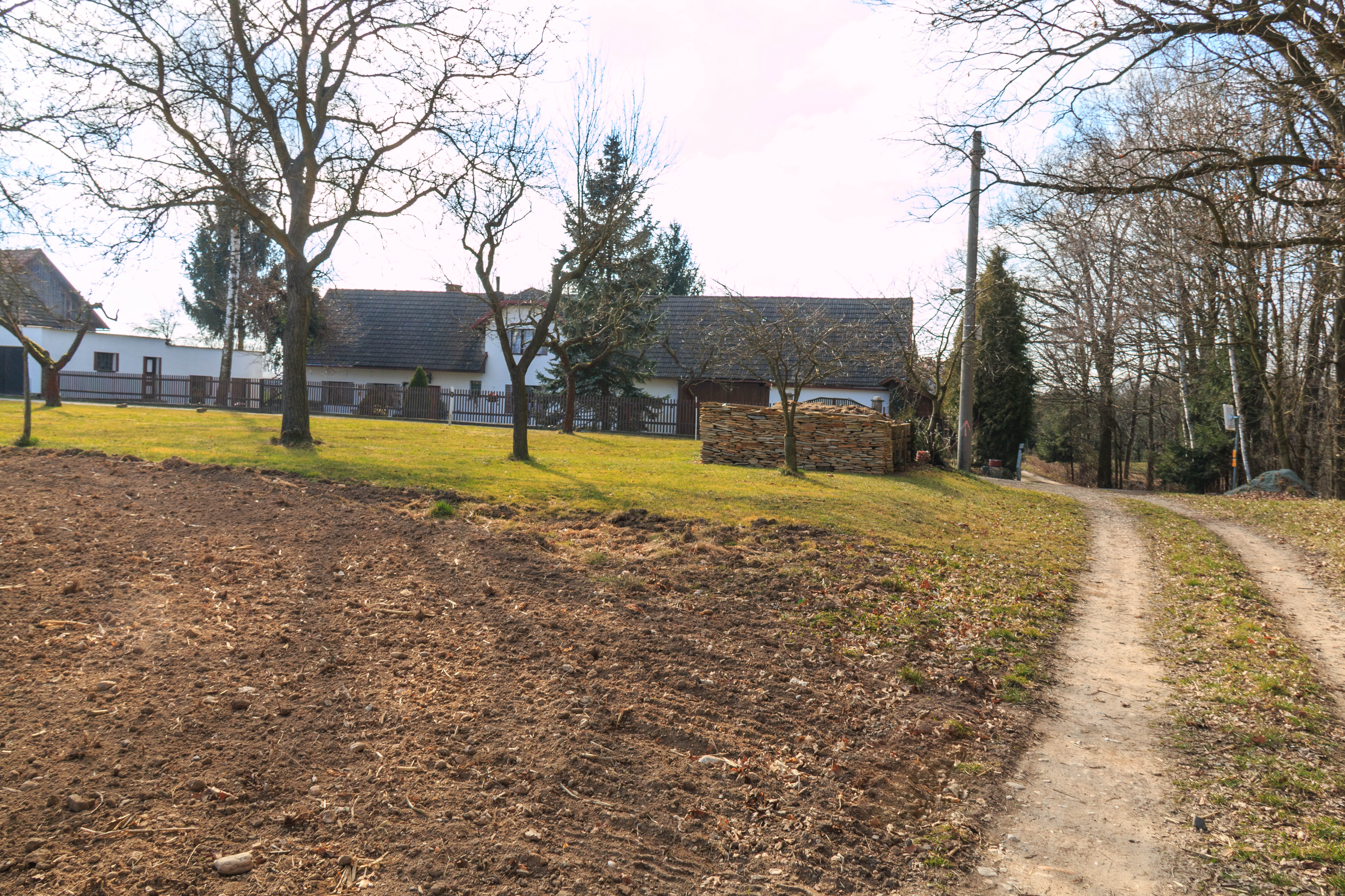 Nouzín čp. 46